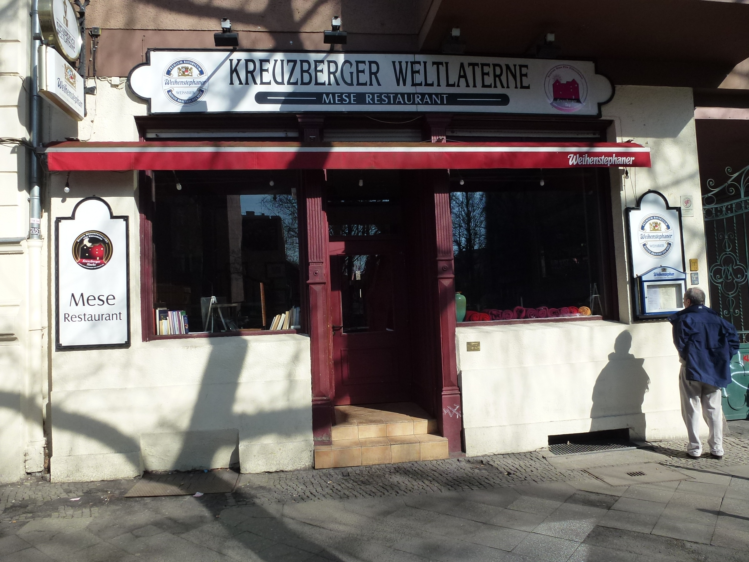 Berlin-Kreuzberg Kohlfurter Straße Kreuzberger Weltlaterne